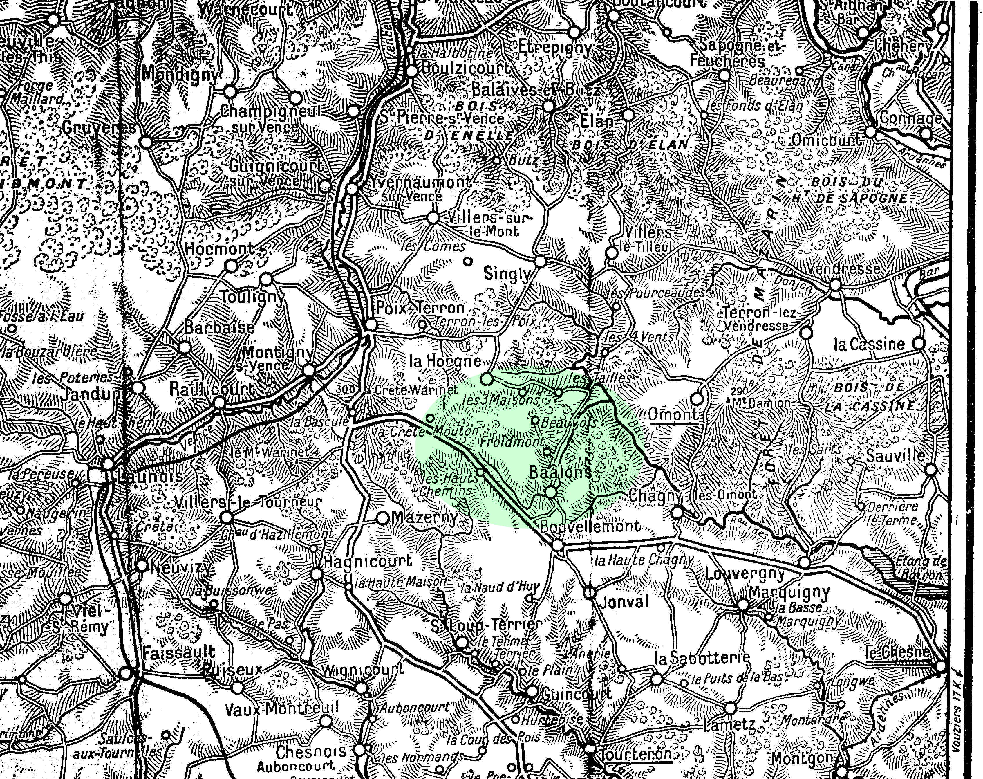 Baâlons (Ardennes, France) & ses environs ; en mai 1940.